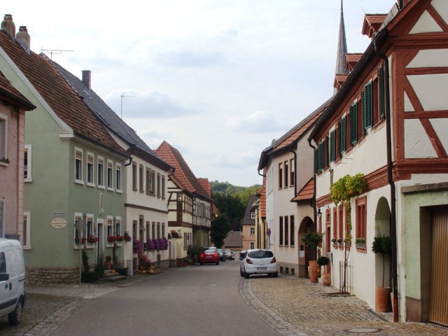 Ensemble Blütenstraße, Blütenstraße, Volkach-Fahr, flankiert von meist zweigeschossigen Giebel- und Traufseithäusern des 18./19. Jahrhundert, vielfach mit FachwerkThis is a photograph of an architectural monument.